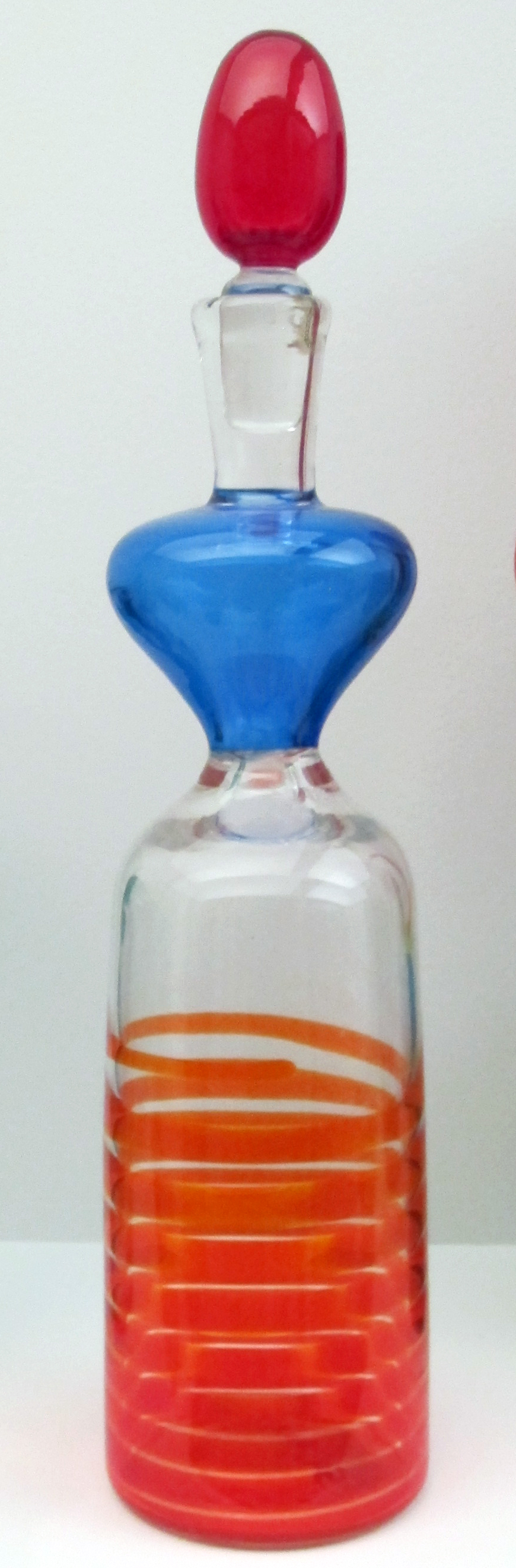 Brooklyn Museum